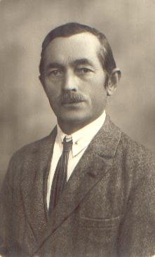 Jonas Grinius (1915 m. gegužės 23 d. Sudeikiuose, Utenos apskritis – 1994 m. rugsėjo 13 d. Bostone. 1995 m. liepos 1 d. jo palaikai perlaidoti Sudeikiuose.) – lietuvių filosofas egzistencialistas.